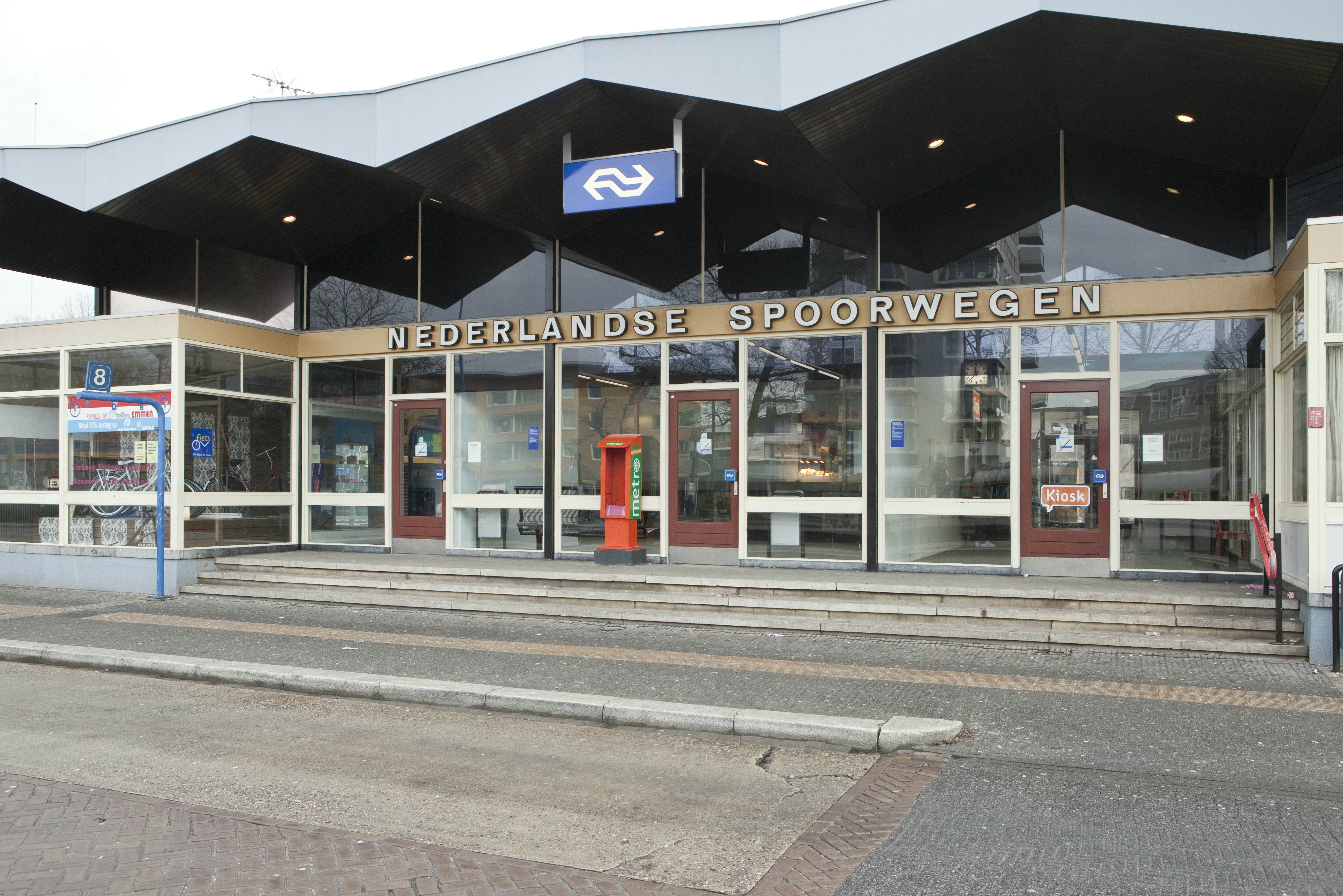 NS Station: Overzicht van de ingangspartij